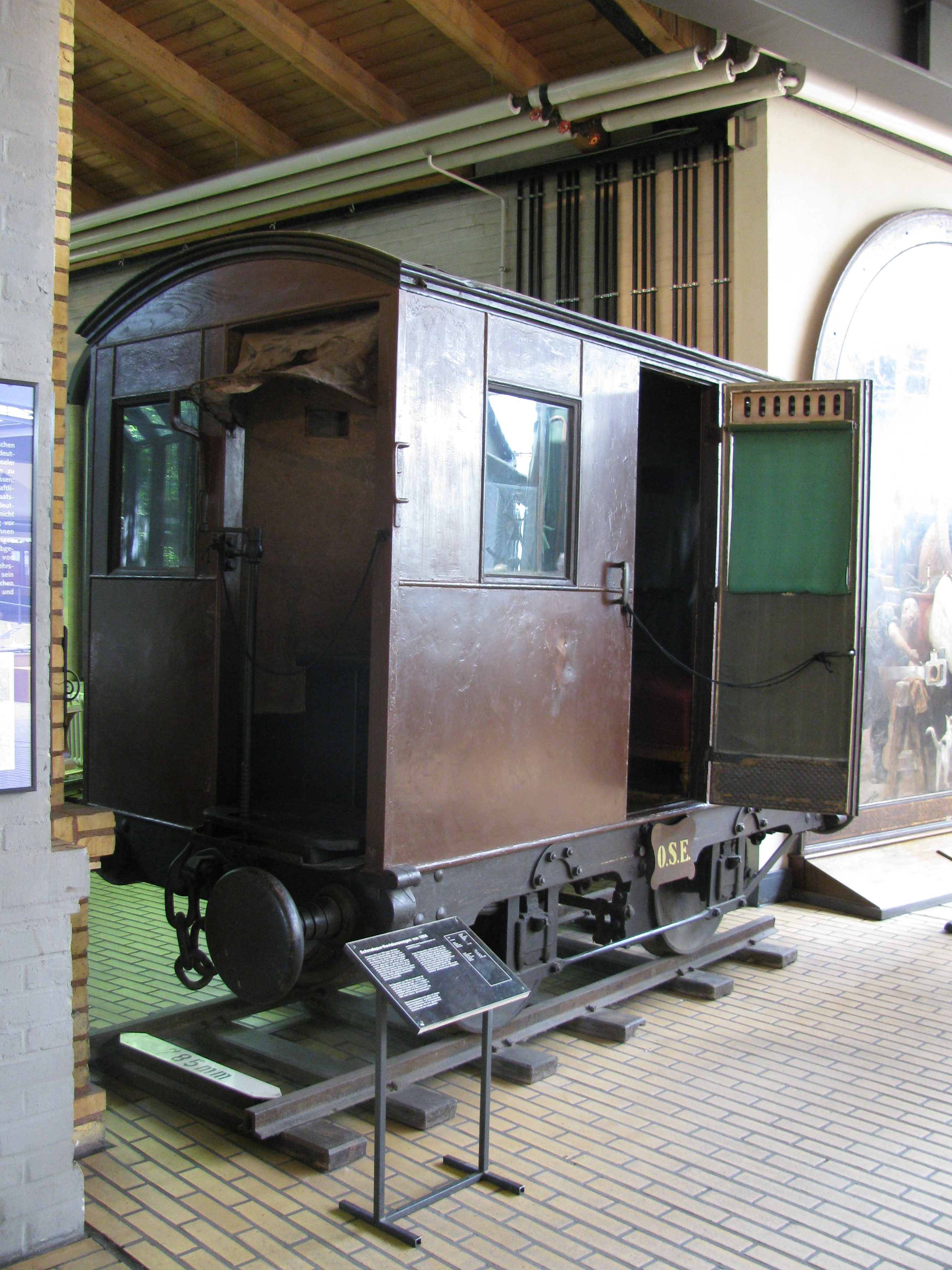 Schmalspur-Revisionswagen der Oberschlesischen Eisenbahn, Baujahr 1856 für Überwachungszwecke und Dienstreisen, beispielsweise im oberschlesischen Steinkohlerevier. Bietet Platz für sechs Personen. Vorne und hinten ein nur von aussen zugänglicher Bremsersitz. 1906 an das Verkehrs- und Baumuseum abgegeben, heute im Deutschen Technikmuseum Berlin.